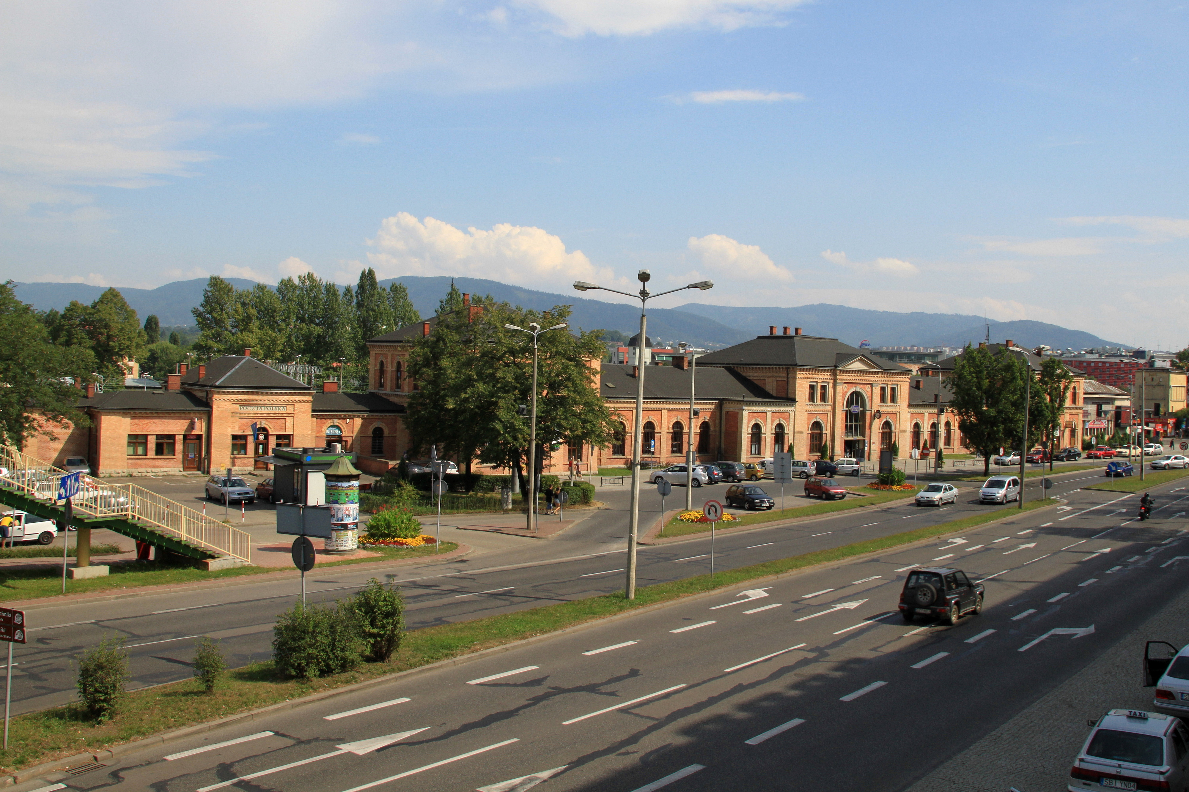 Bielsko-Biała, dworzec kolejowy - Główny, 1889-1890